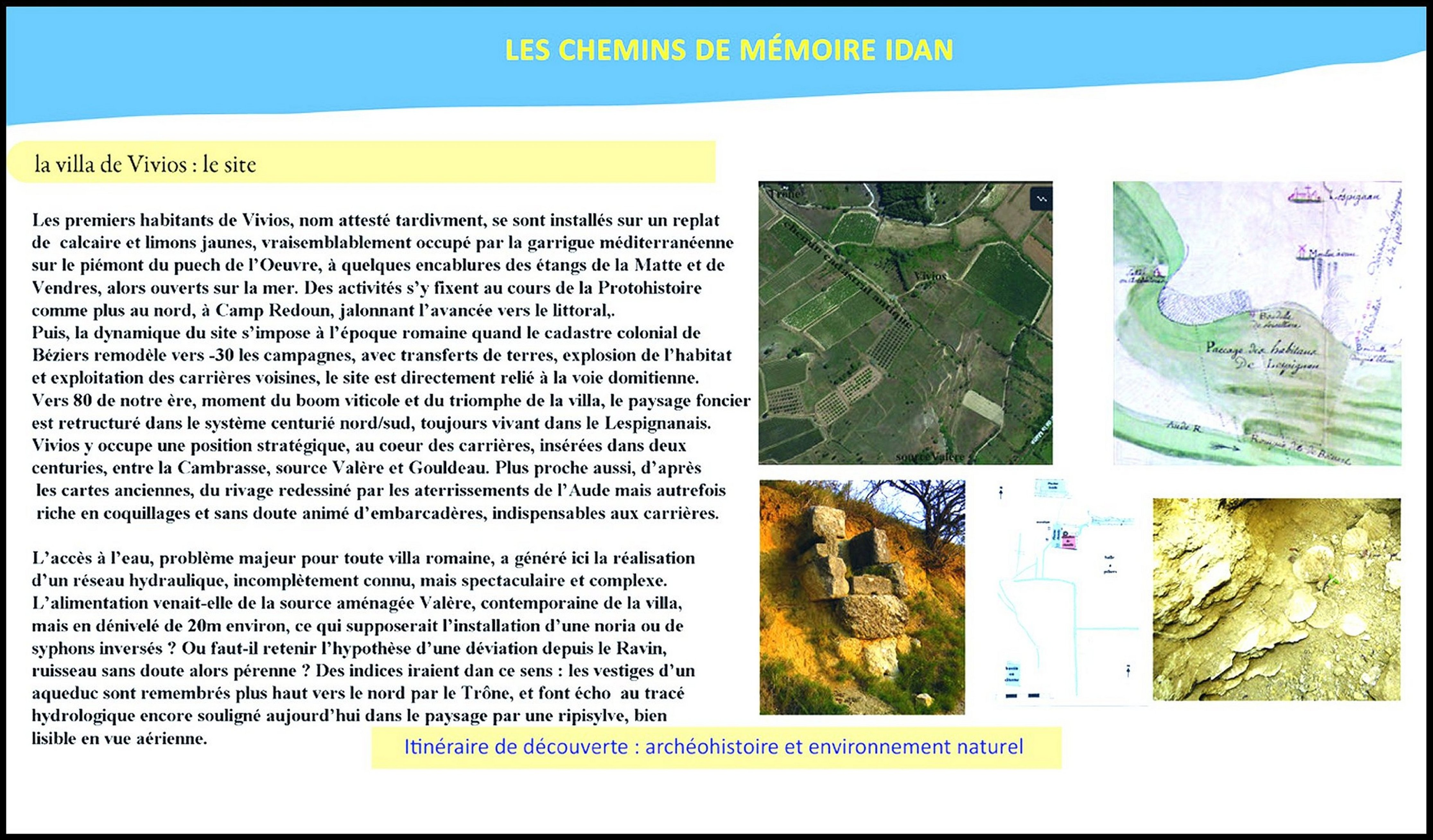 Lespignan (Occitanie : Hérault) : site de la villa gallo-romaine de Vivios. Panneau Idan; projet.